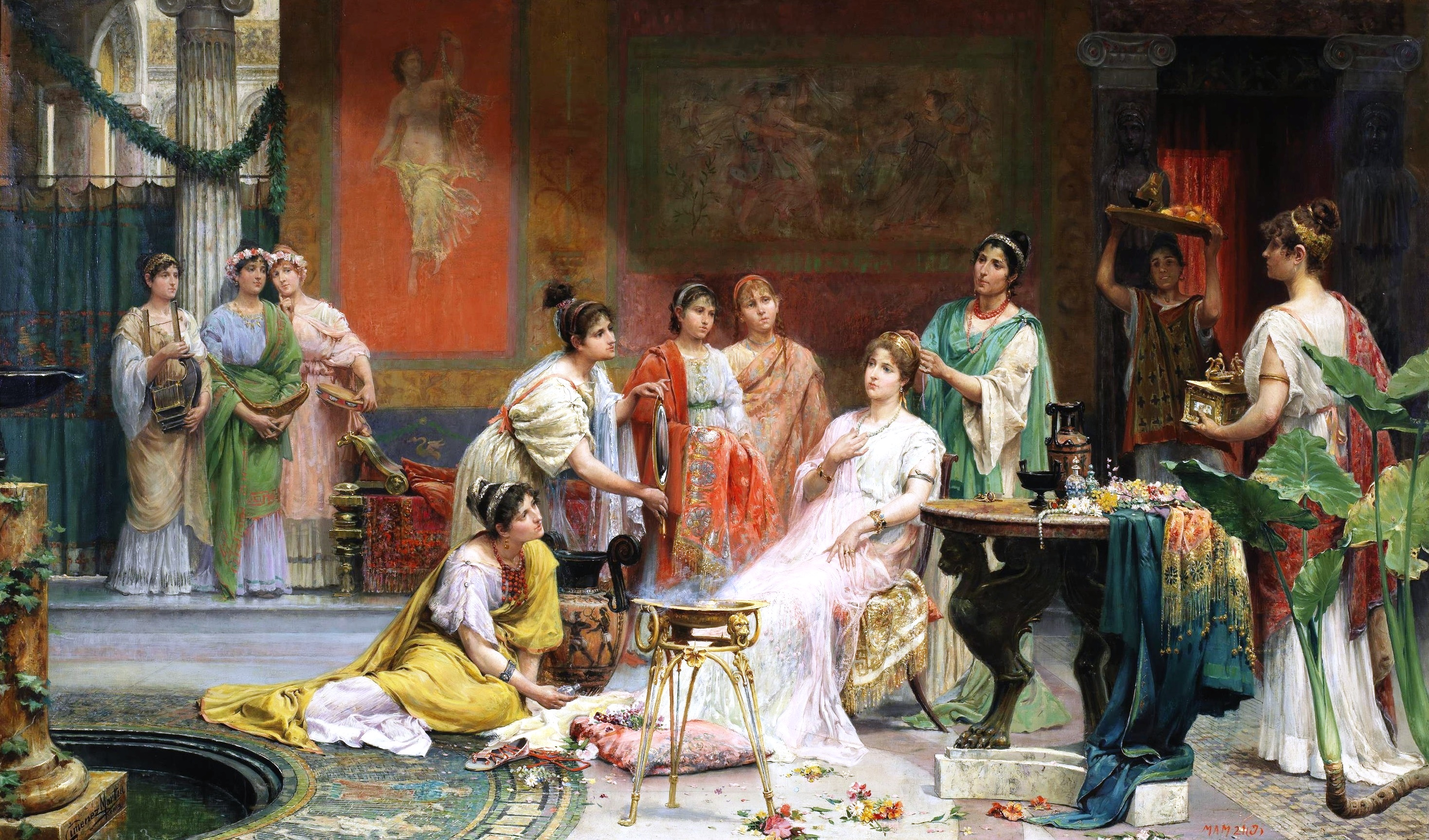 La obra representa a un grupo de mujeres romanas en el interior del tocador de una matrona.